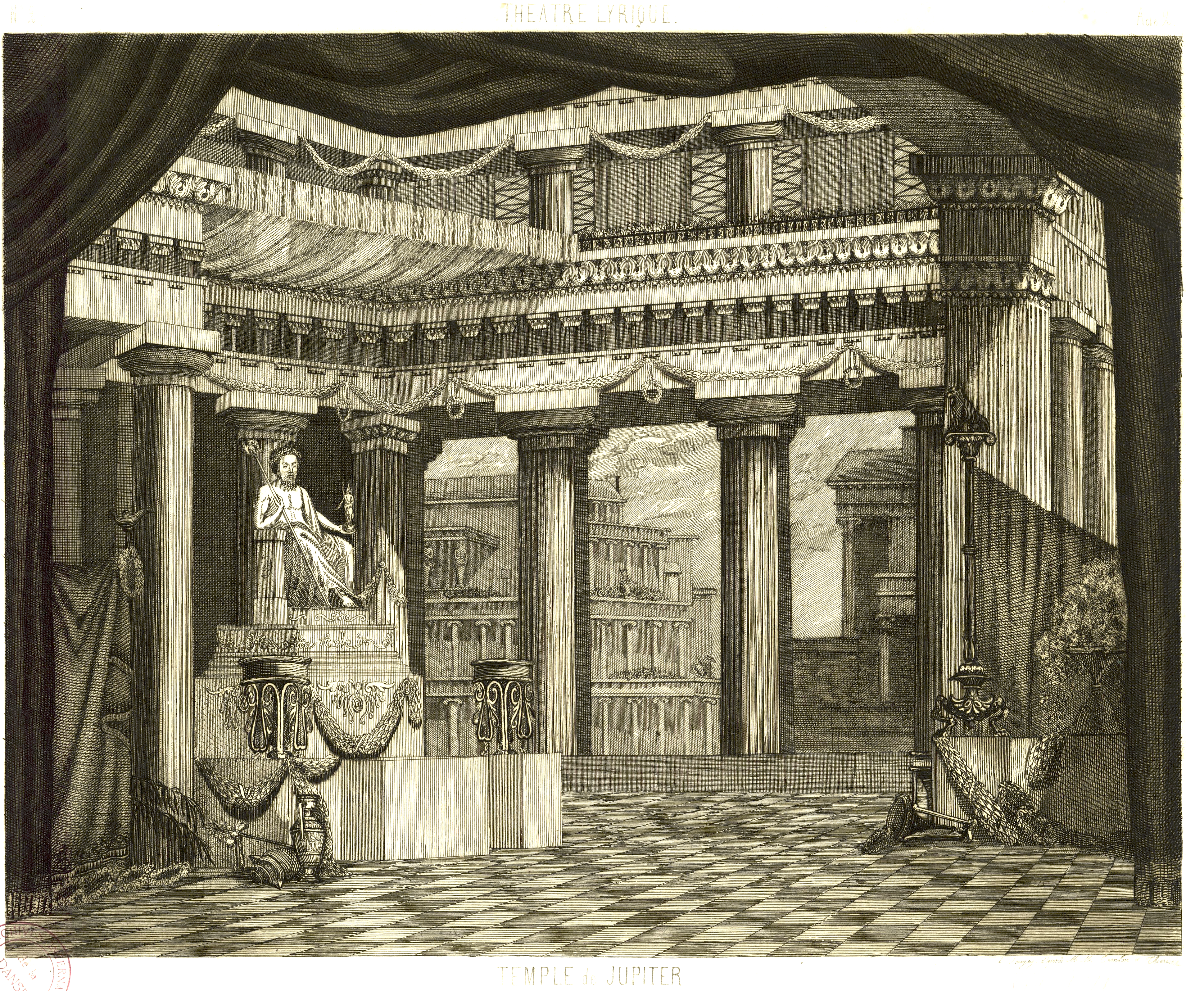 Philémon et Baucis : opéra-comique en 3 actes / musique de Charles Gounod. - Paris : Théâtre Lyrique, 18-02-1860. Jaugey, L. (18..-18.. ; dessinateur). Dessinateur du modèle. Graveur Author : Cambon, Charles-Antoine (1802-1875). Peintre du modèle Author : Thierry, Joseph (1812-1866). Peintre du modèle